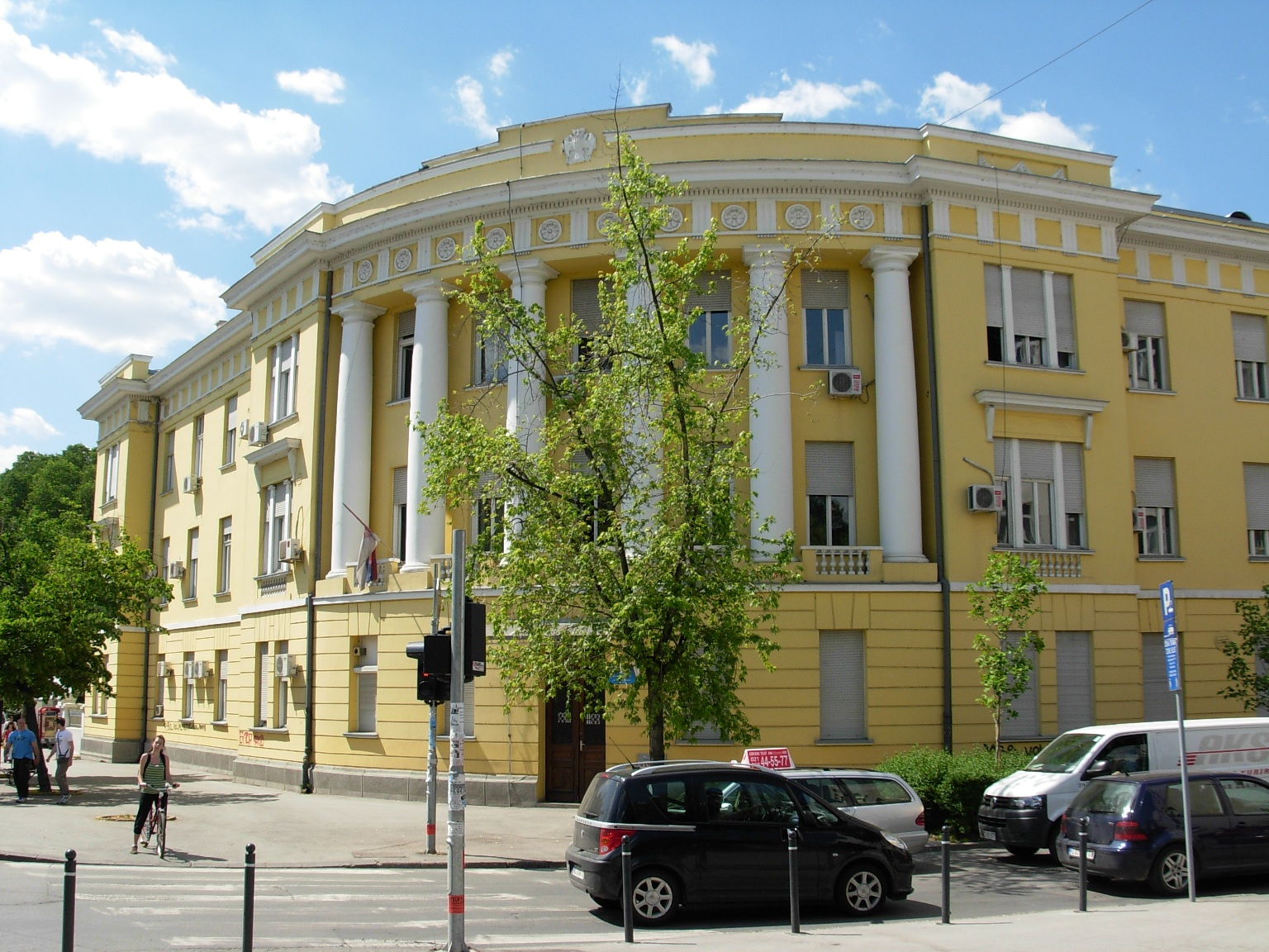 Dom zdravlja Bulevar u Novom Sadu.